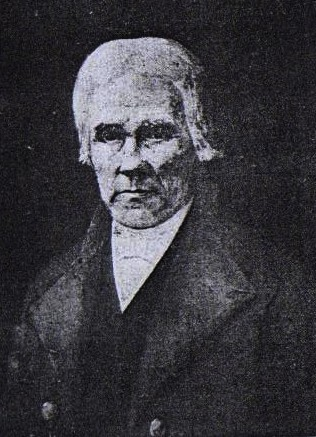 retrato d'Esteve Pelabon (en franchute Etienne Pelabon) ; autor provenzal de lengua occitana. De ser auténtico es anterior a 1808. Su publicacion en una reedicion de Maniclo es de 1901